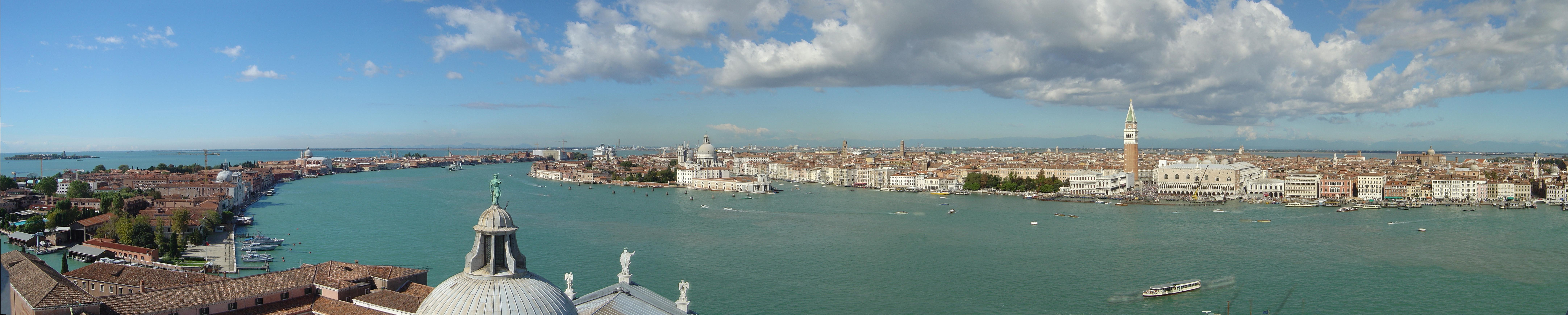 Vue depuis Chiesa di San Giorgio Maggiore